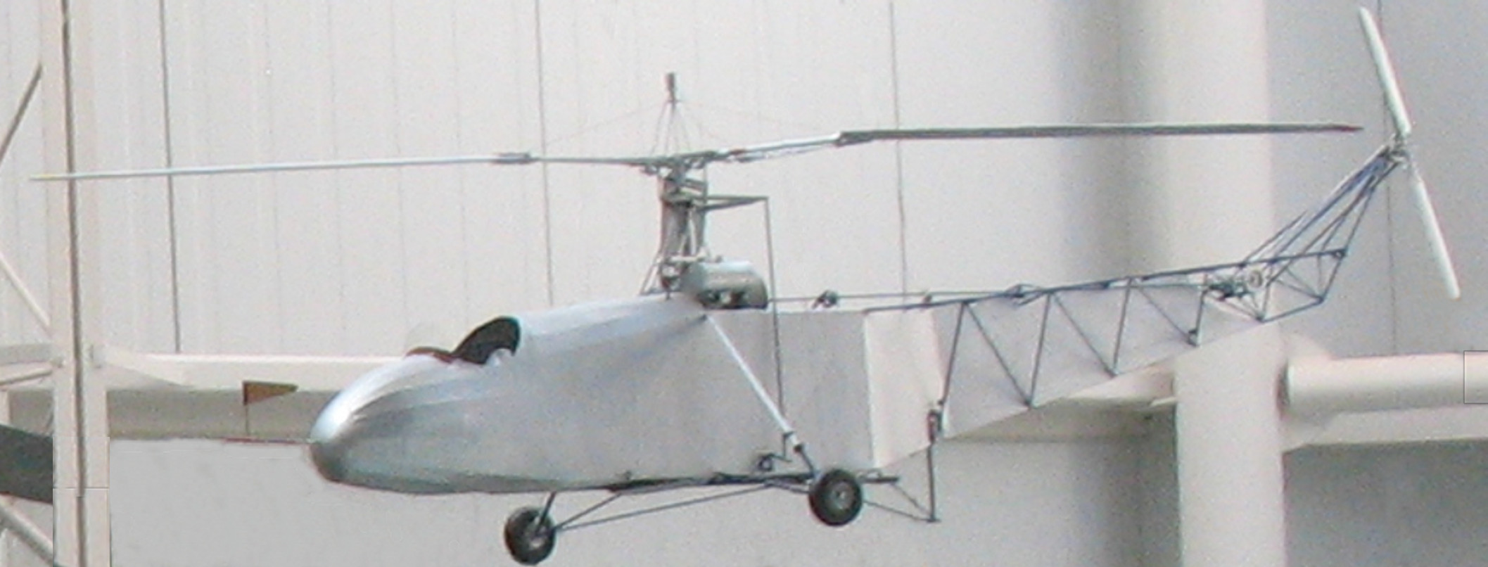 Particolare da by Horatius (Lic. come originale)